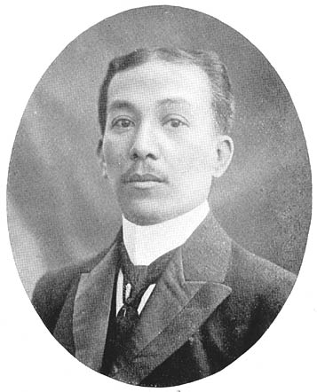 Felipe Agoncillo, a Filipino diplomat